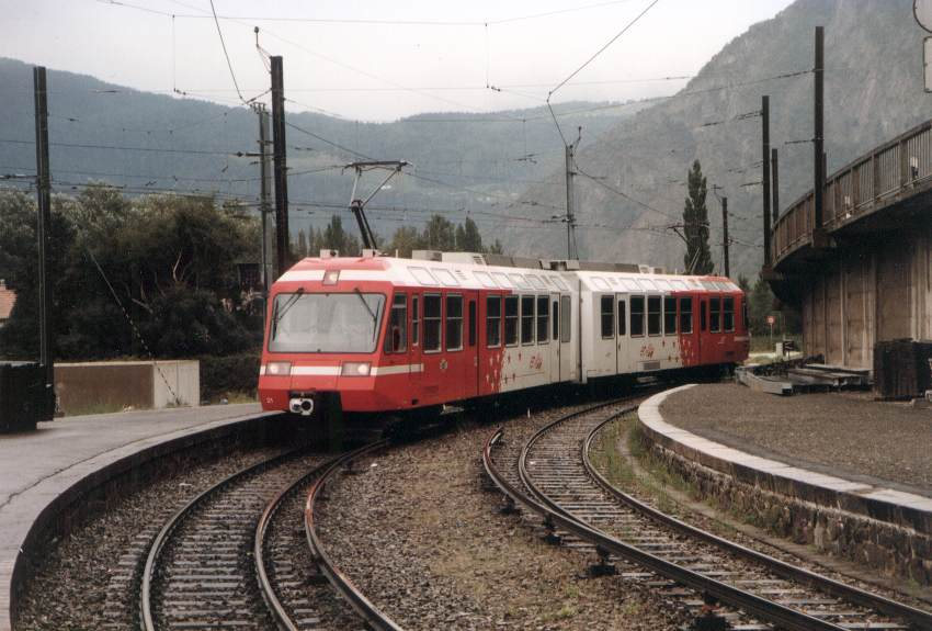 Description